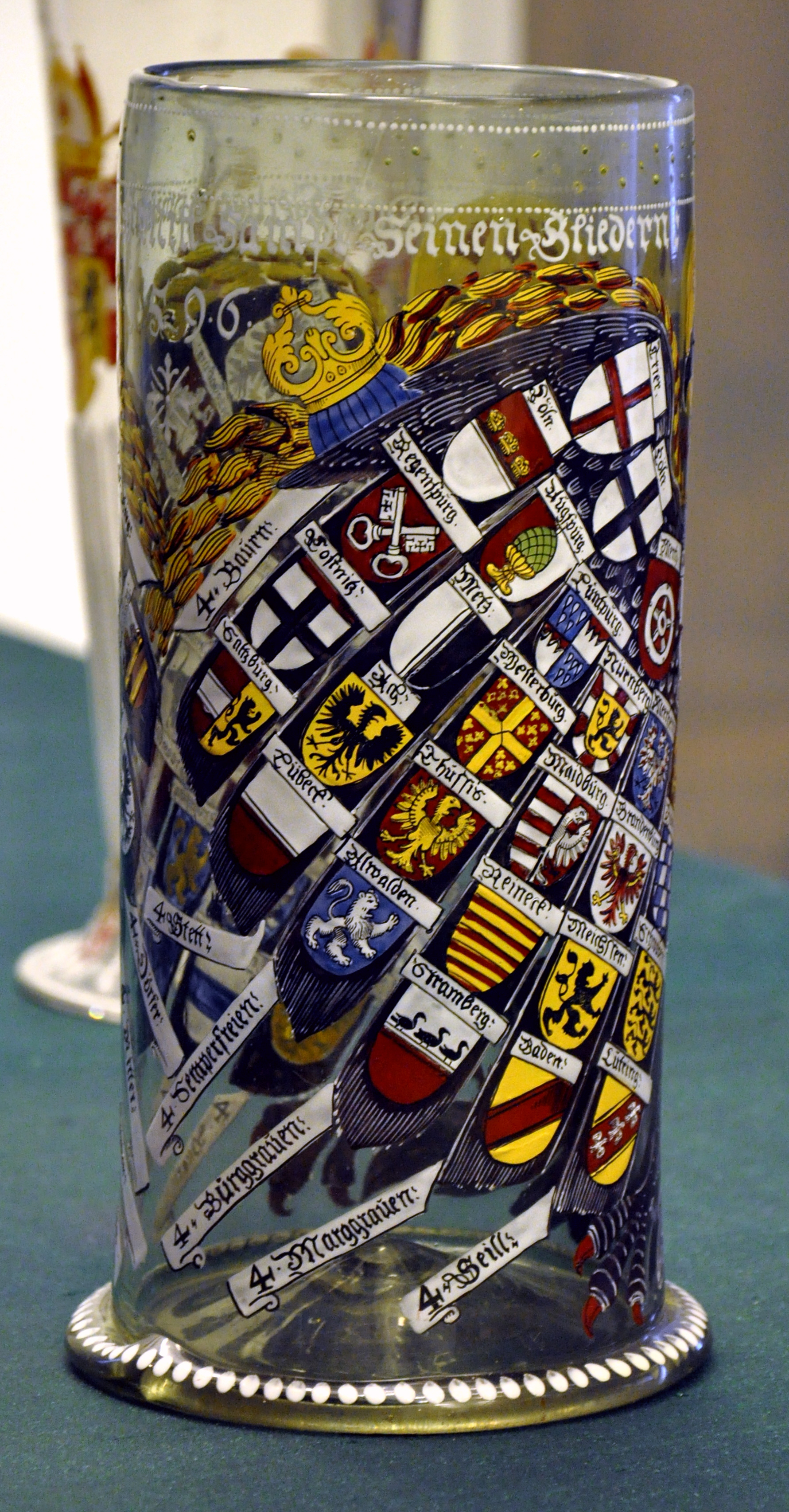 Reichsadlerhumpen, Böhmen, datiert 1596, Glas mit Emailmalerei Museum für Angewandte Kunst, Frankfurt, Inv. Nr. X 13809